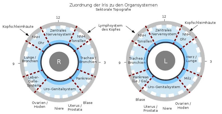 Eine in der Irisdiagnostik verwendete sektorale Einteilung der Iris nach Organsystemen